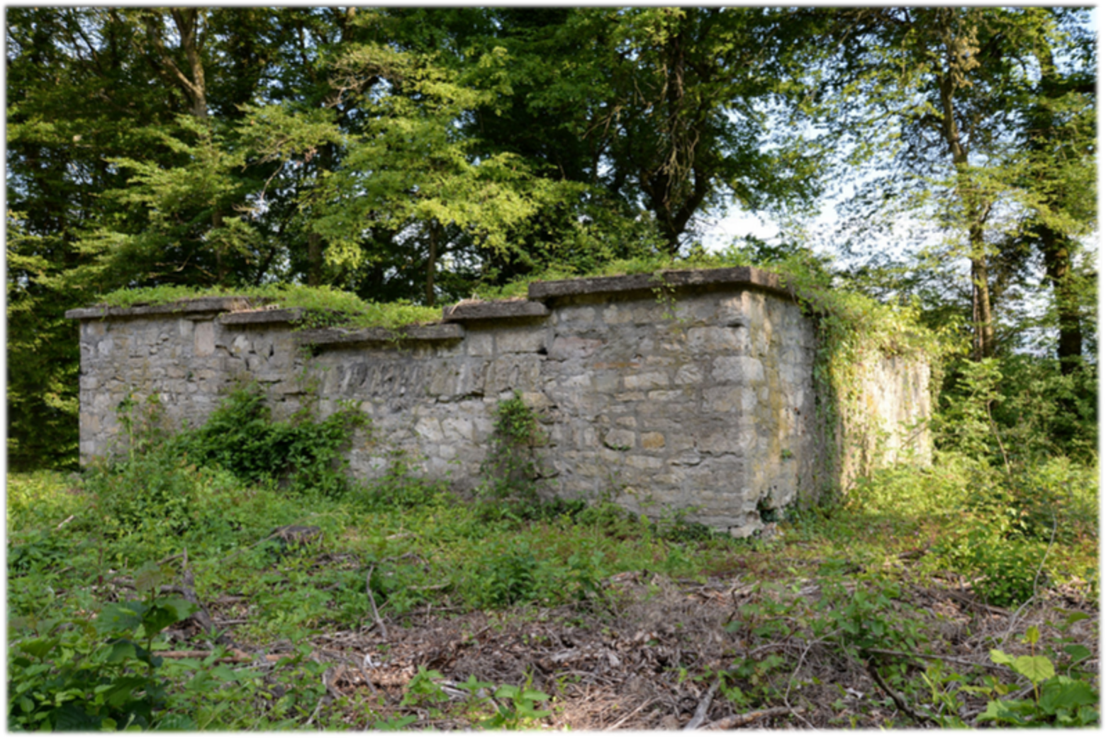 Aufnahme der Überreste des spätrömischen Wachturms Koblenz Kleiner Laufen (CH), vor der Sanierung von 2014 (Blick aus Süd).